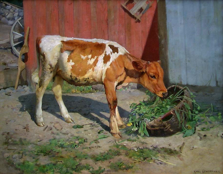 Norwegian: I solveggentitle QS:P1476,no:"I solveggen" label QS:Lno,"I solveggen"